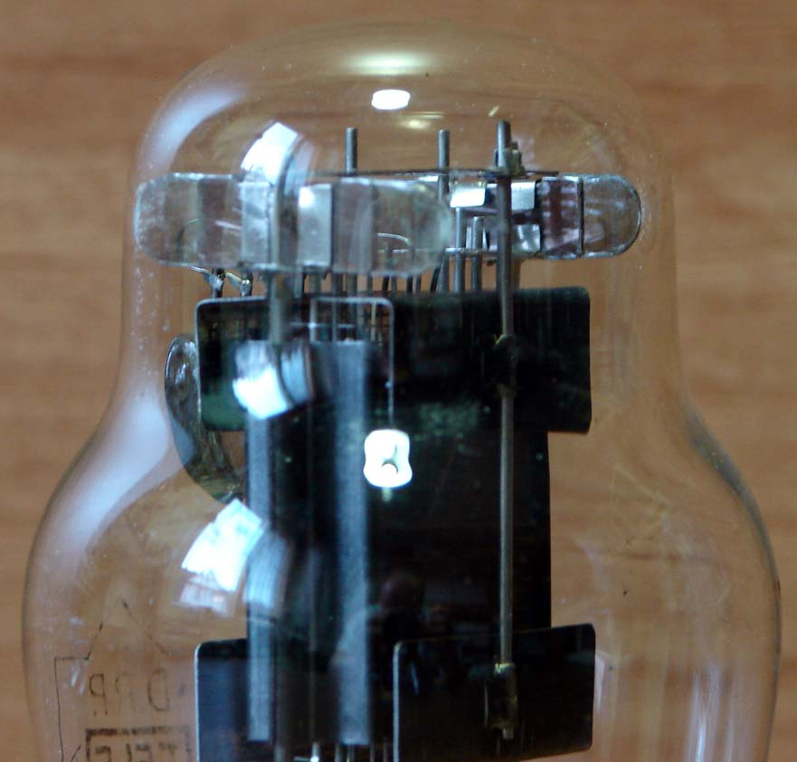 Röhre AL1 - Ansicht auf die Halteflügel aus Glimmer im Domkolben